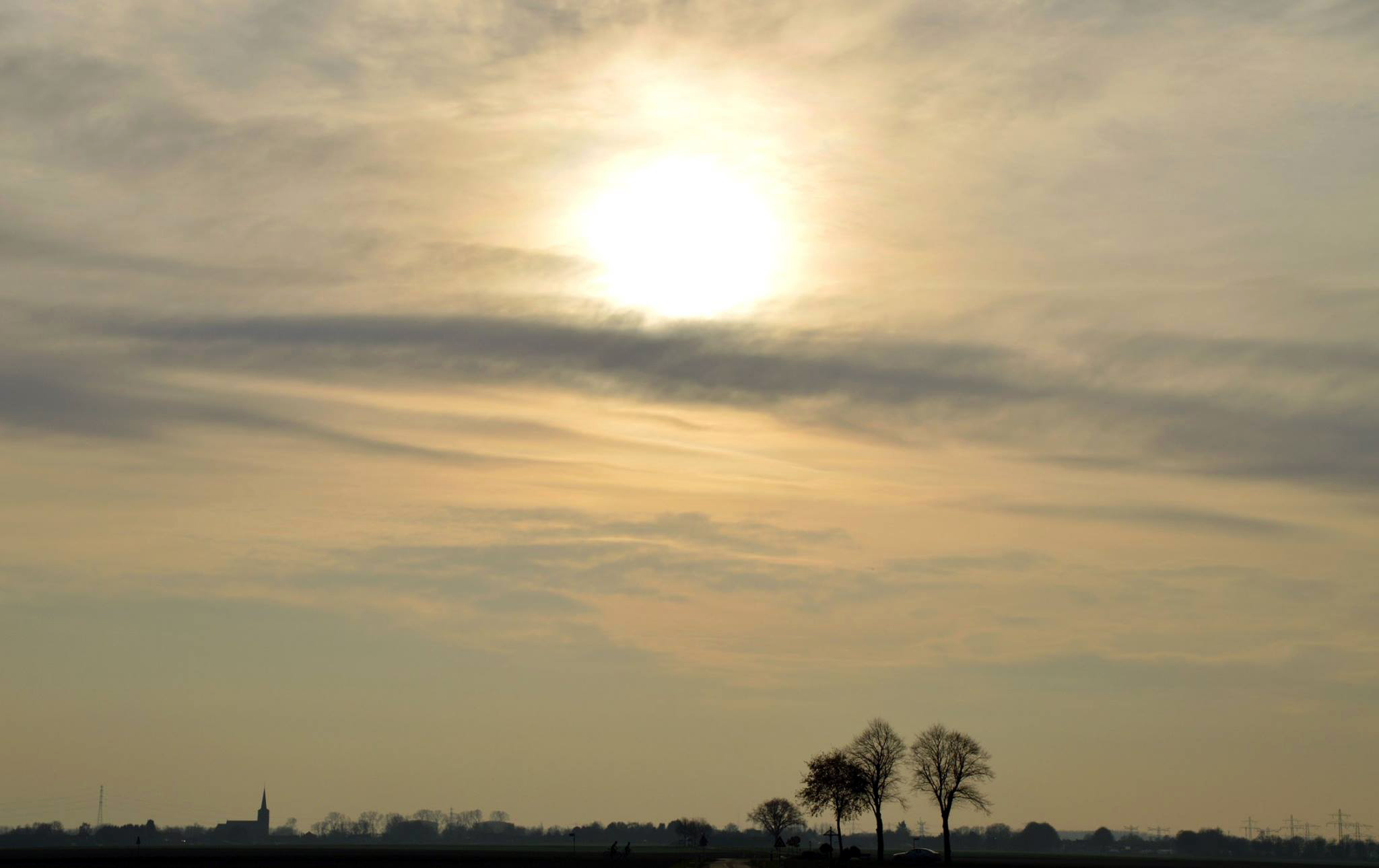 Buggenum gezien vanuit Neer (het Noorden) Limburg, NL